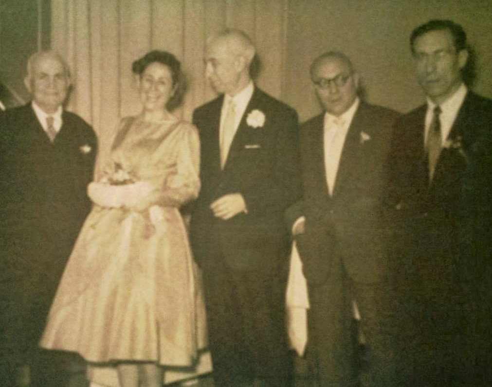 Ricard Sanmartí, Enric Matatí y Francesc Ferrer Pastor en Barcelona en 1959